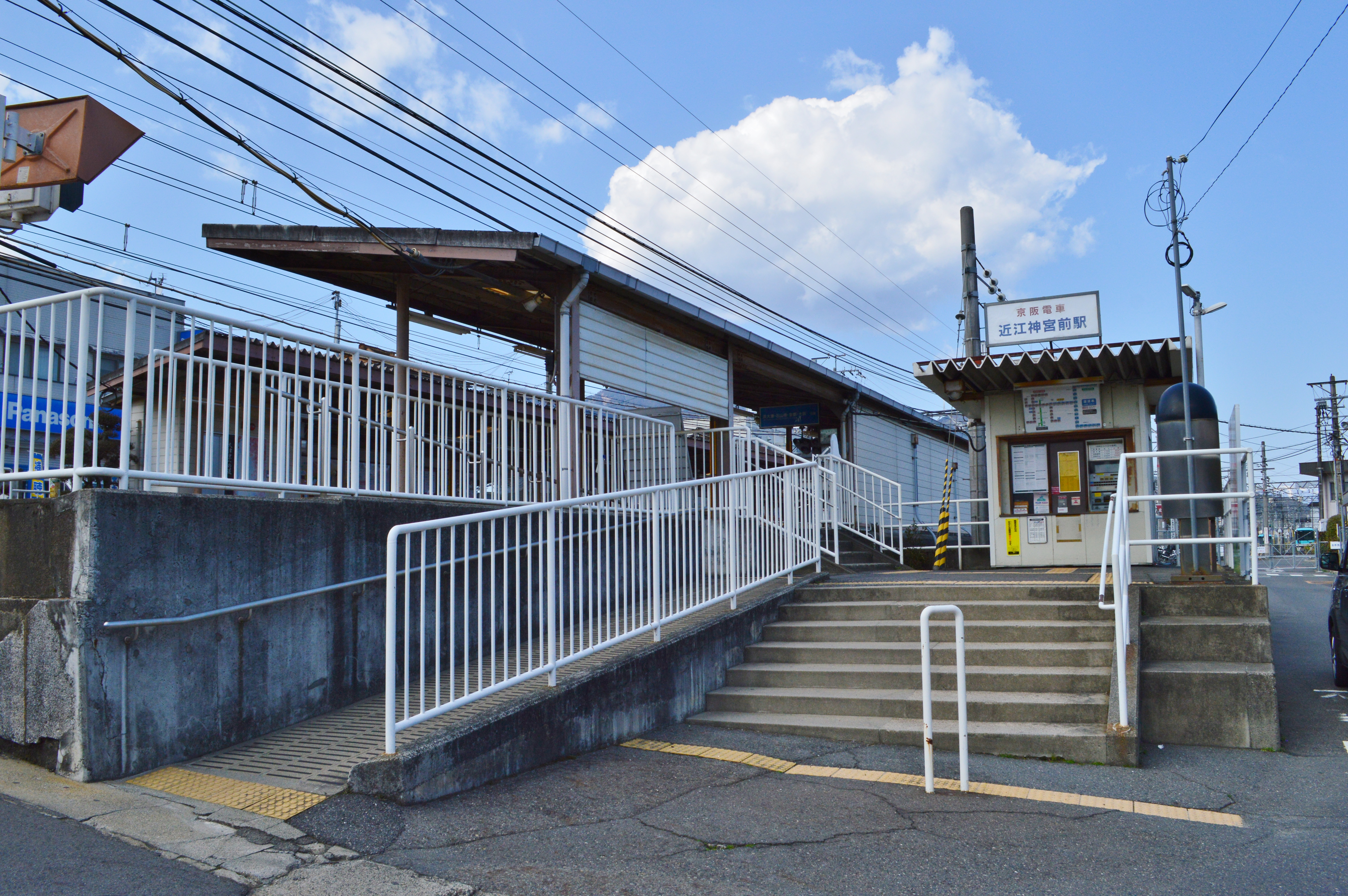 近江神宮前駅 駅舎